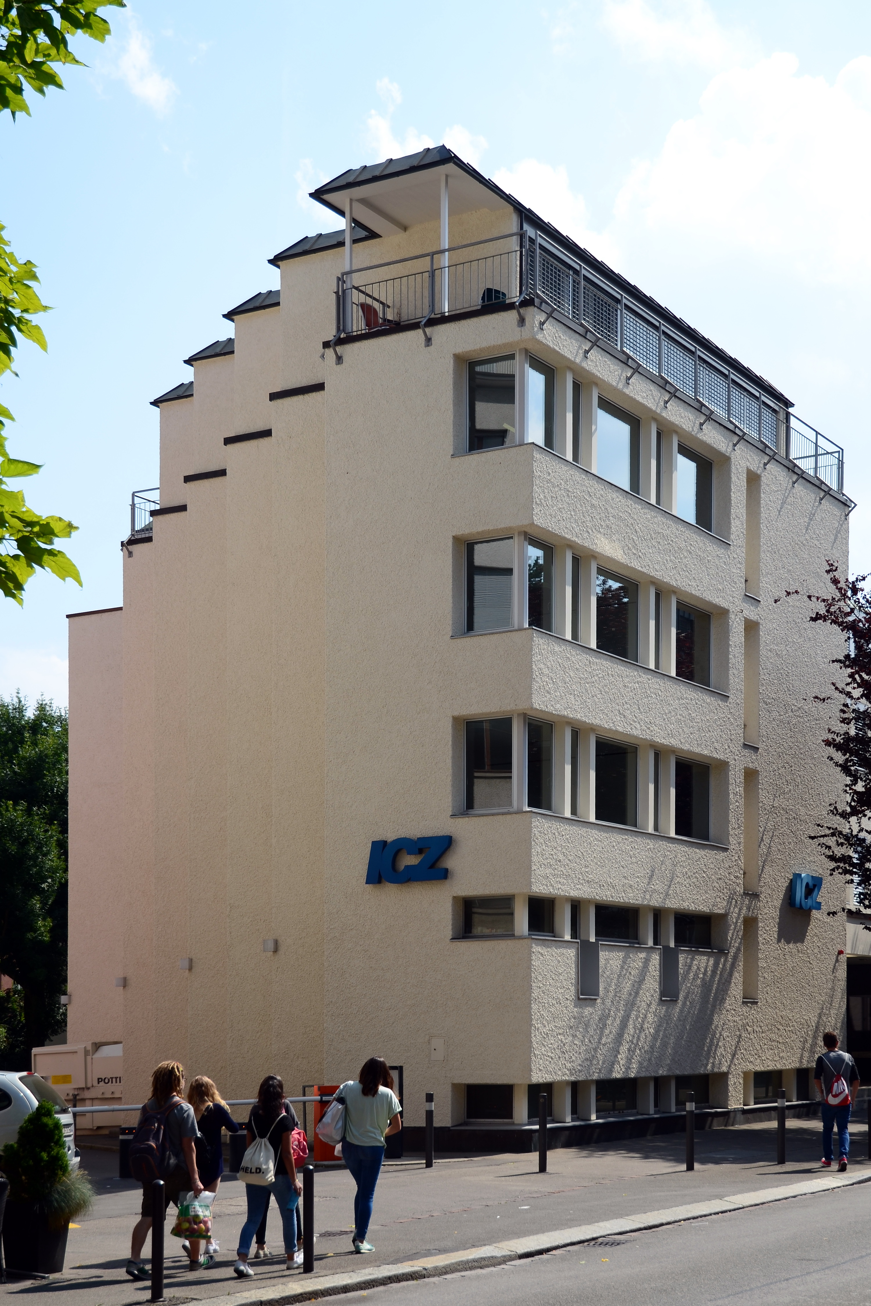 Bibliothek der Israelitischen Cultusgemeinde Zürich